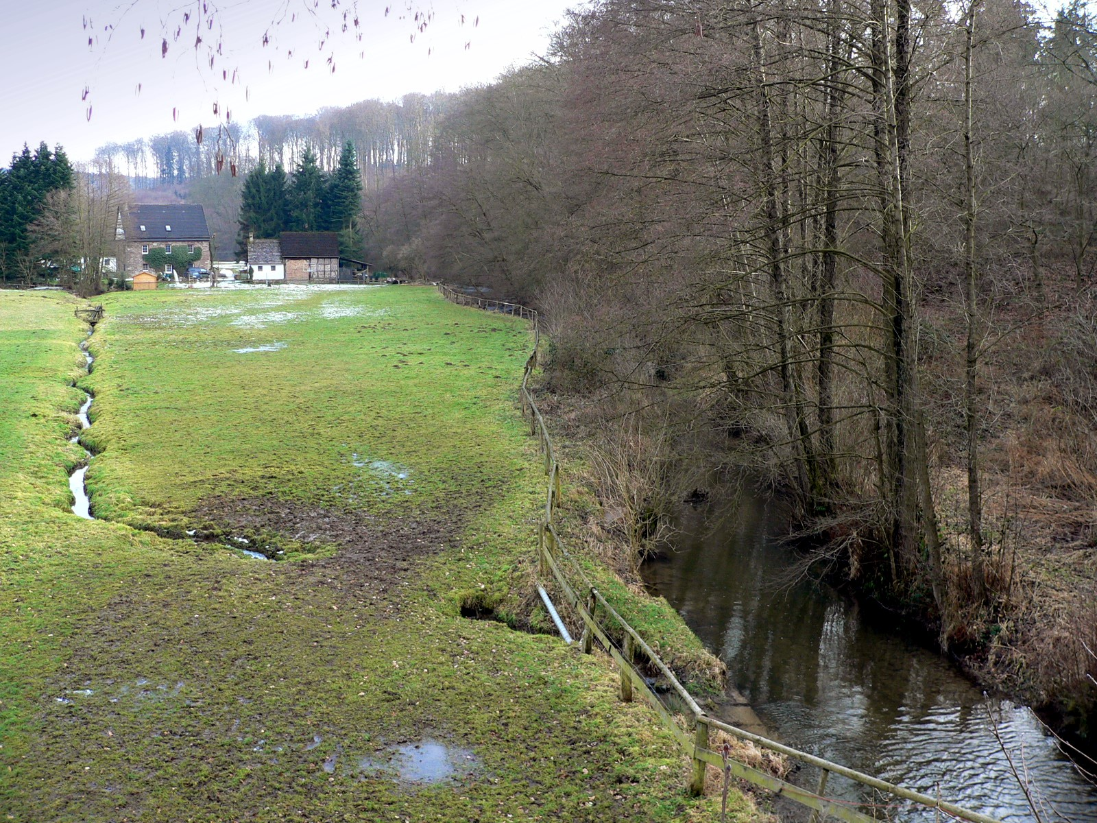 Die Holzape und Mühlbach an der Gutsmühle Wülmersen Quelle: selbst fotografiert Fotograf: presse03 11:18, 20. Feb 2006 (CET) Datum: Februar 2006